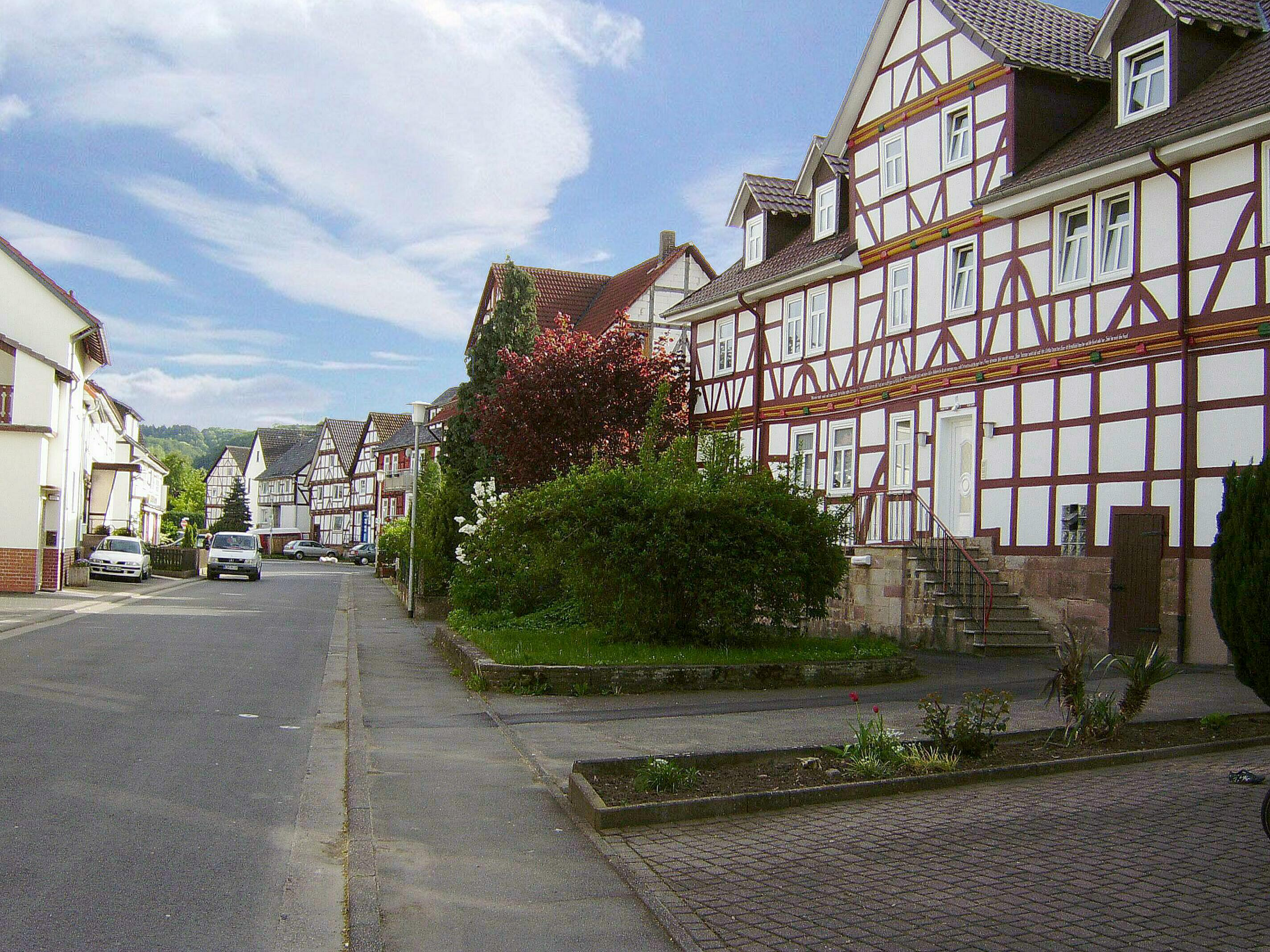 Hundelshausen - Kirchstrasse